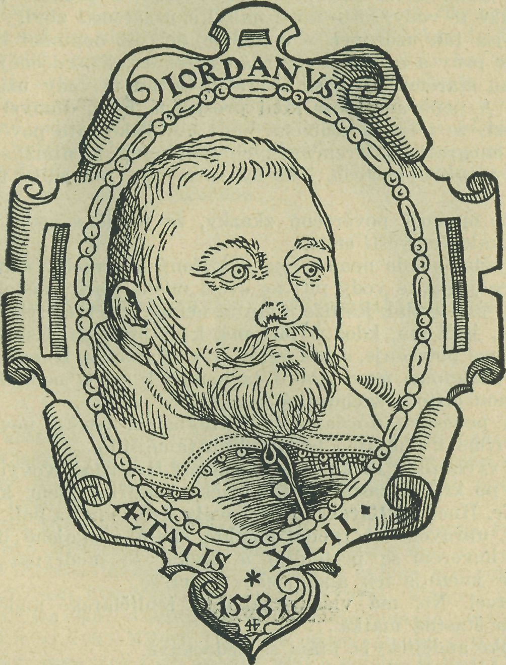 medailon s poprsím Tomáše Jordána z Klausenburku